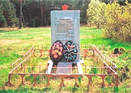 Обновленный памятник евреям Уллы, убитым во время Холокоста. Находится в 3-4 километрах от Уллы в направлении на Миск, примерно в 100 метрах от дороги, недалеко от станции скорой помощи.